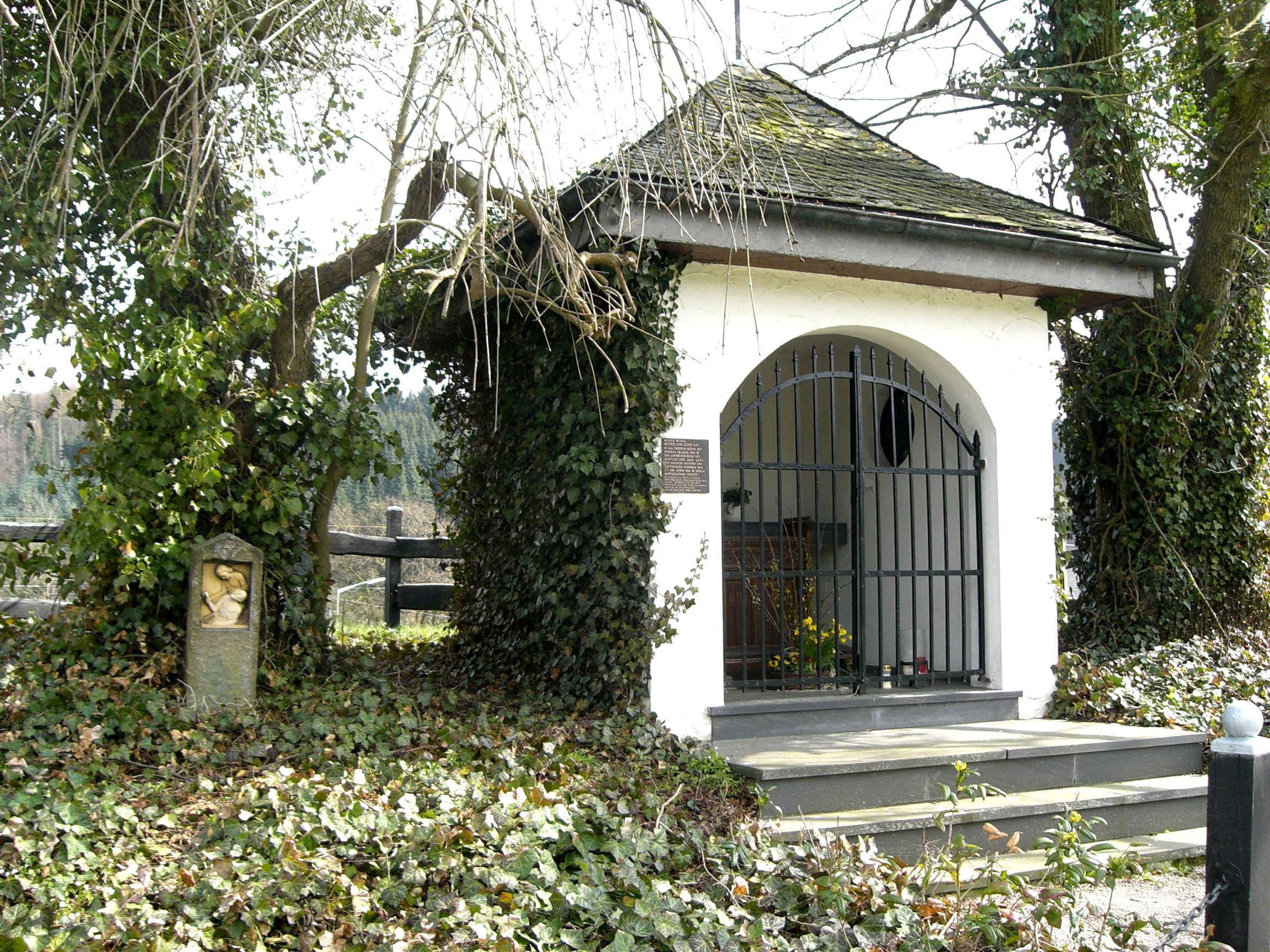 Andachtstätte (Mutter des guten Rats) mit Kniebänken und Außenanlagen